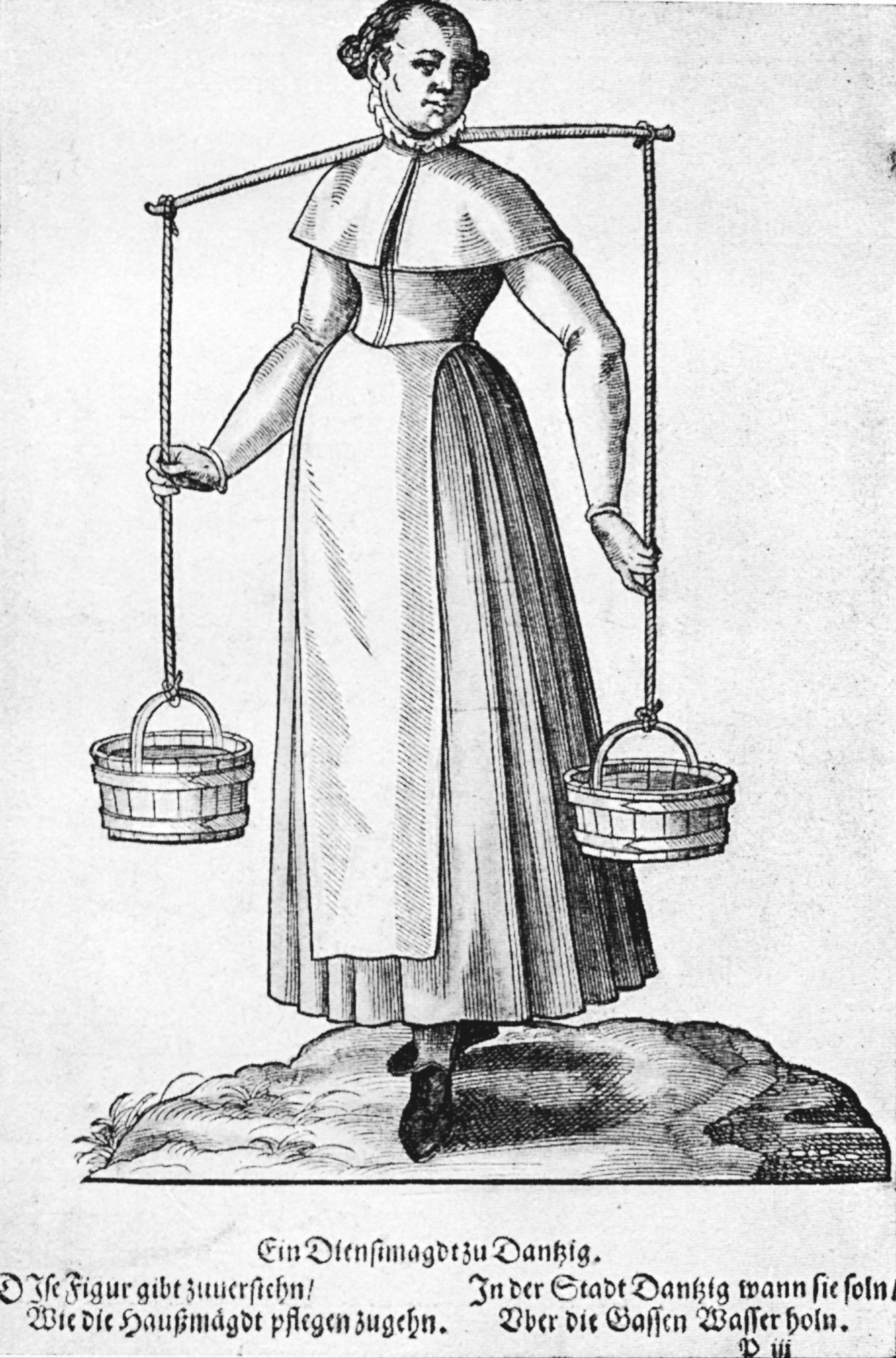 Ein Dienstmagdt zu Dantzig („Die Figur gibt zuuerstehen / Wie die Haußmägdt pflegen zugehn. / In der Stadt Dantzig wann sie soln / Vber die Gassen Wasser holn.“)